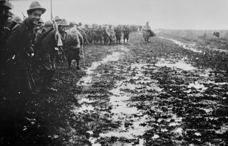 Il fango (rasputitza) che accompagnò l'avanzata dei reparti italiani durante tutta la campagna sul fronte orientale